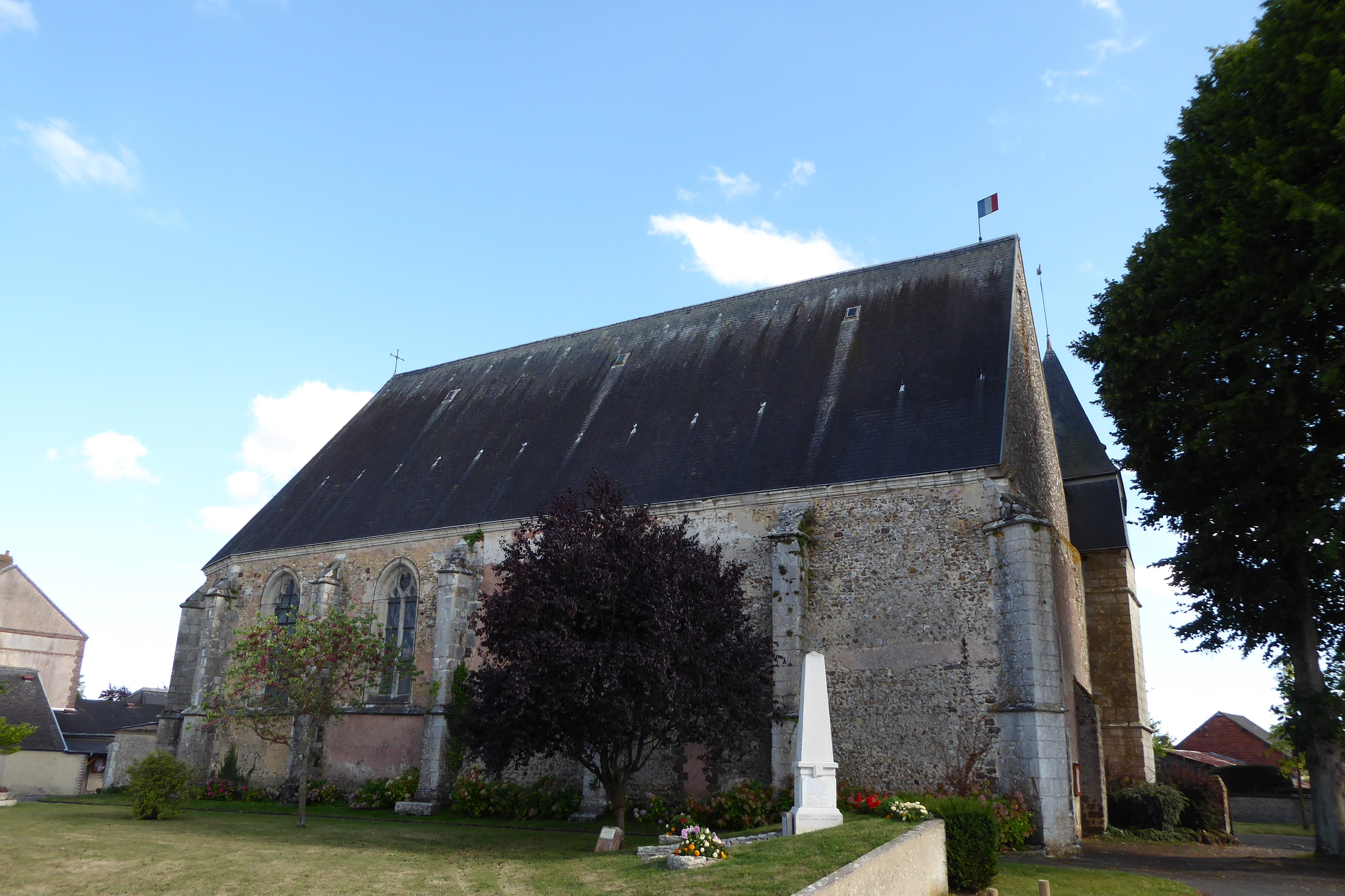 l'église Saint-Didier et le monument aux morts, Magny, Eure-et-Loir (France).